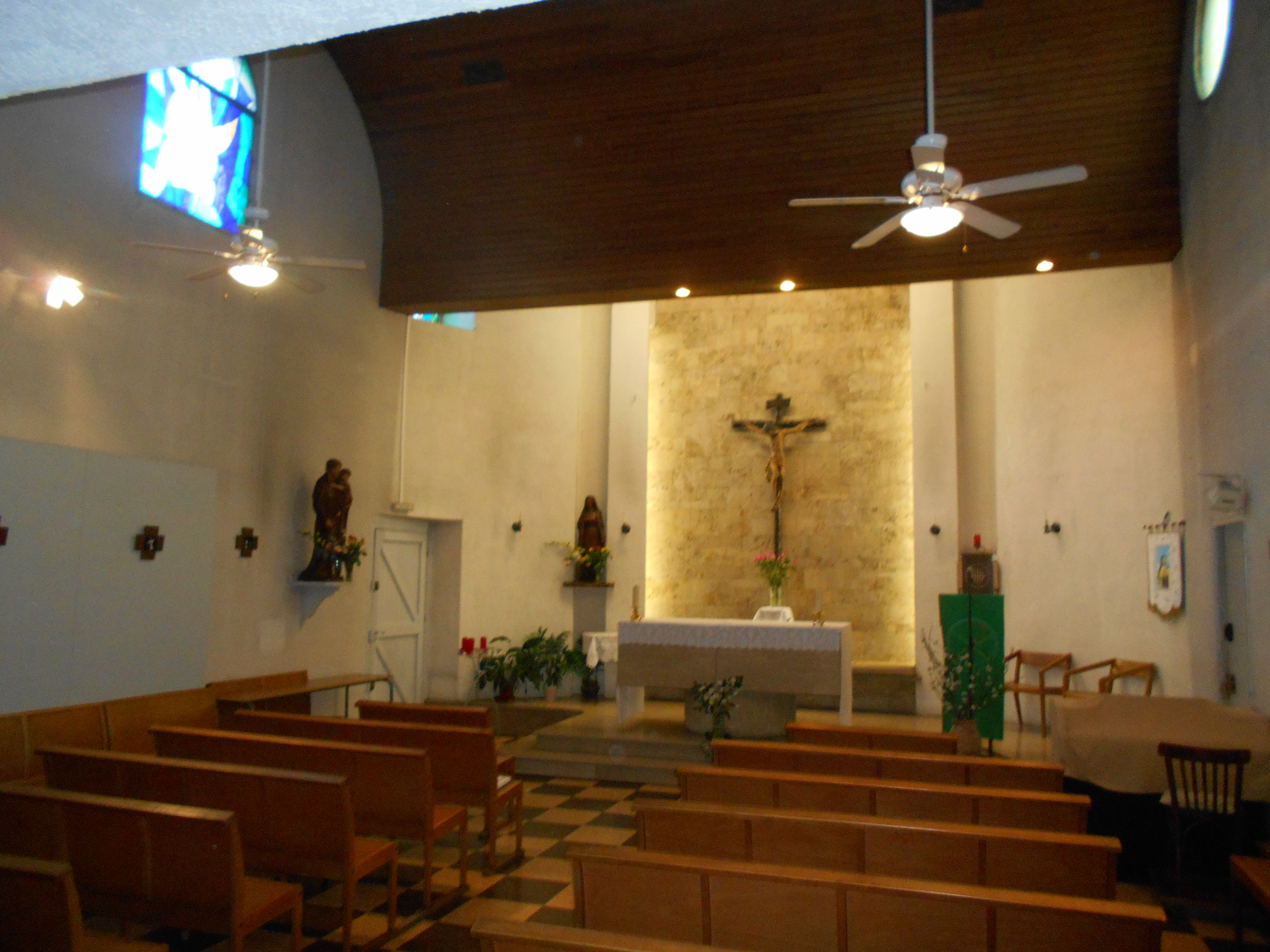 Interior de Santa Teresa del Nen Jesús de Peprinyà